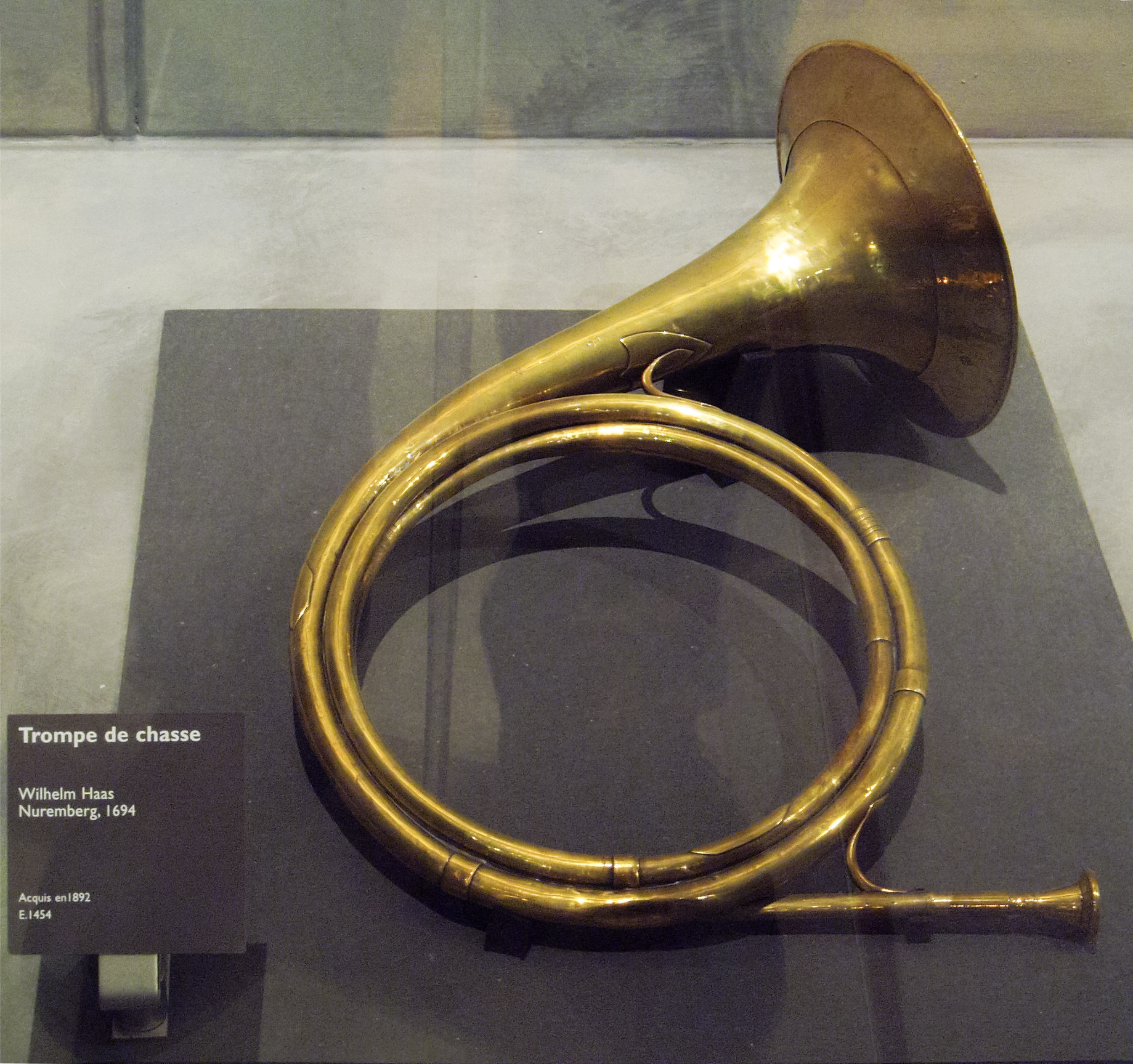 Hunting Horn - Wilhelm Haas, Nurember, 1694 - Paris, musée de la musique